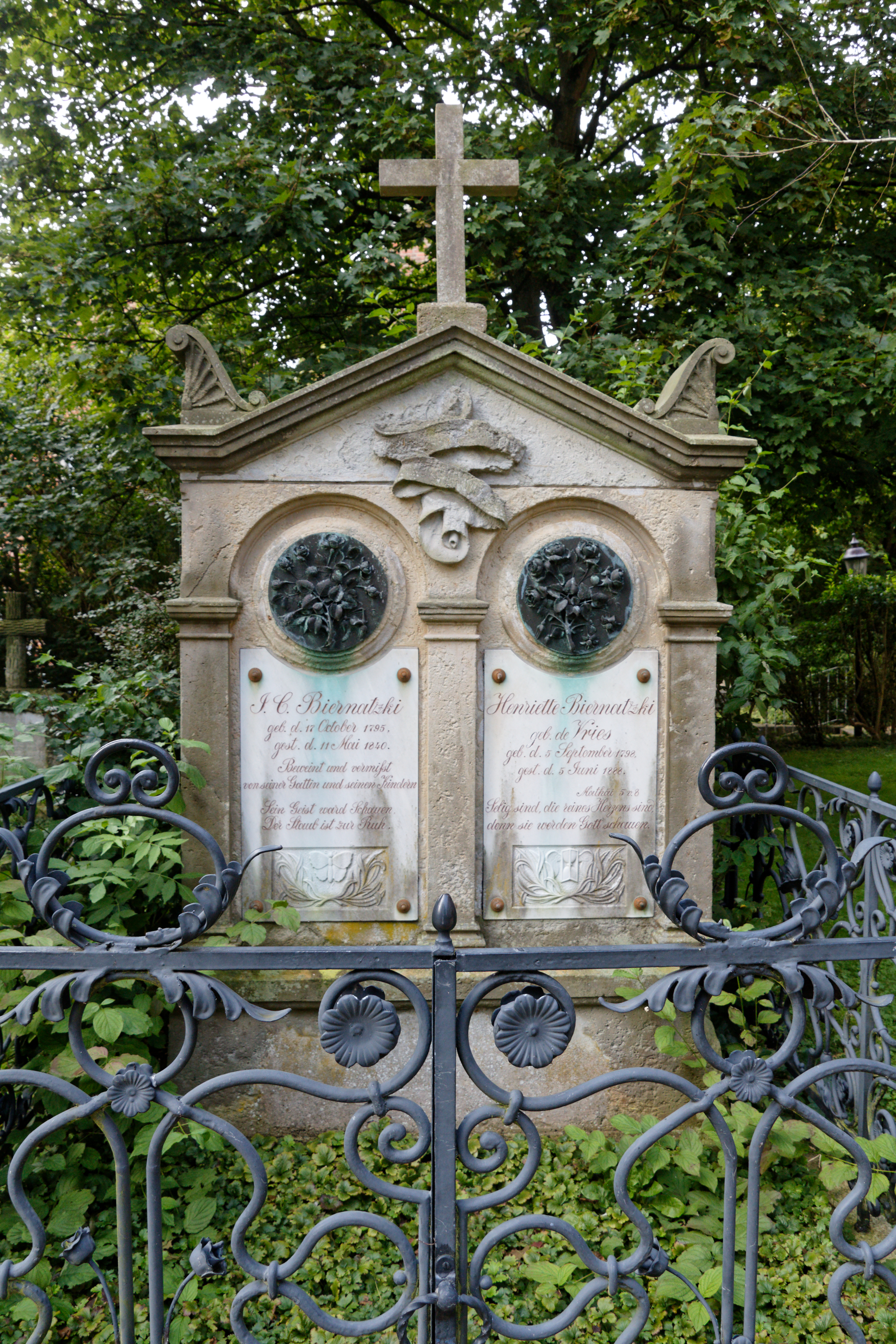 Friedrichstadt Holstein, Christopherus Kirche, Grabstein für Johann Christoph Biernatzki